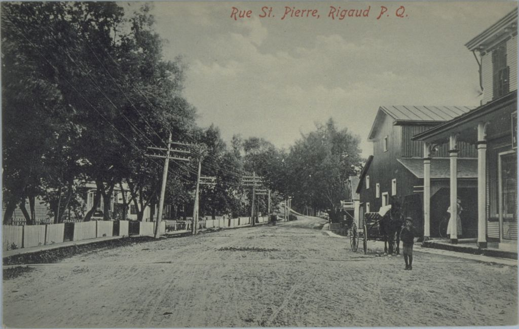 carte postale, J.L. Pinsonneault, Édit.